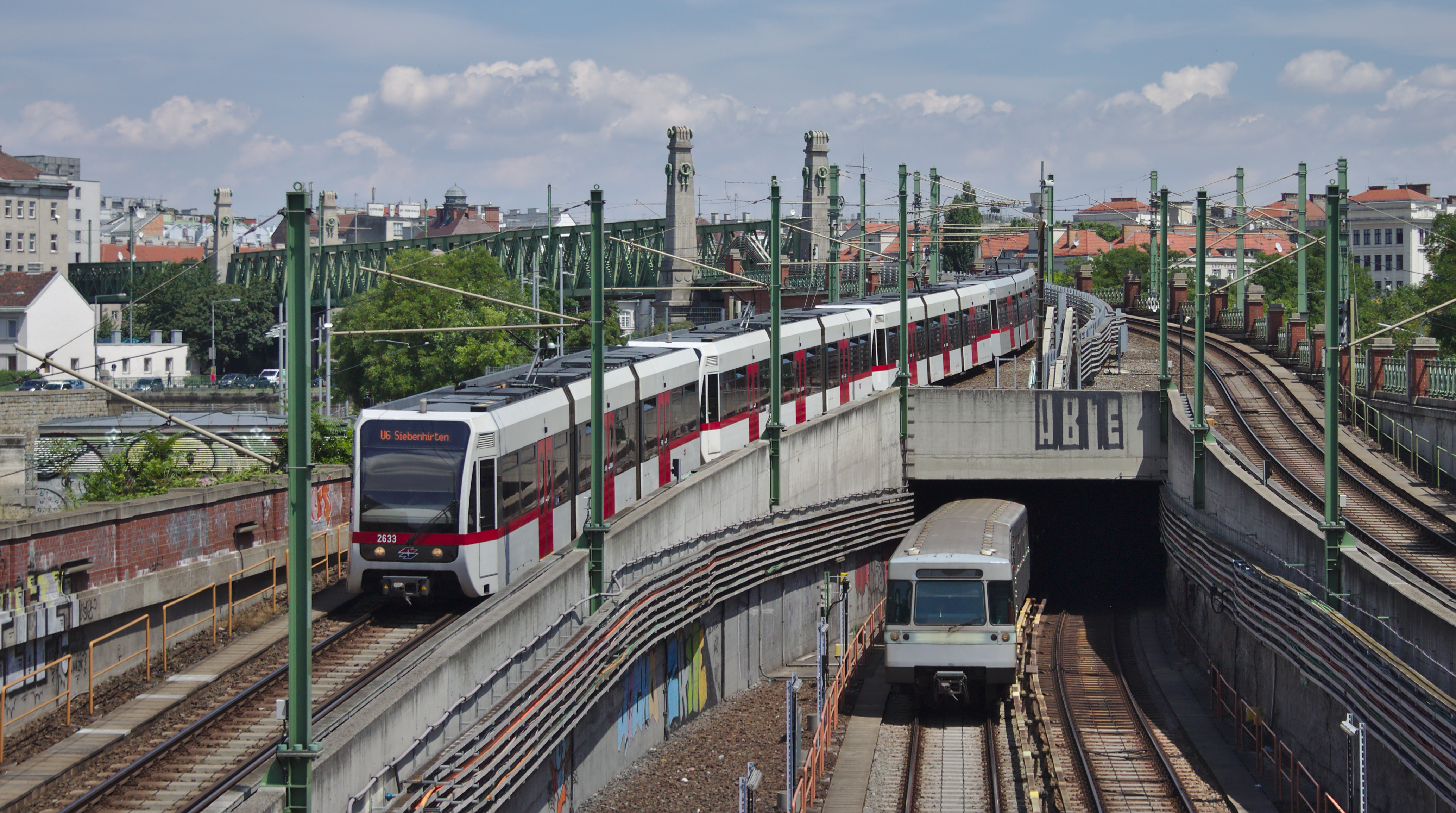 ehem. Stadtbahn - Teilbereich der heutigen U4